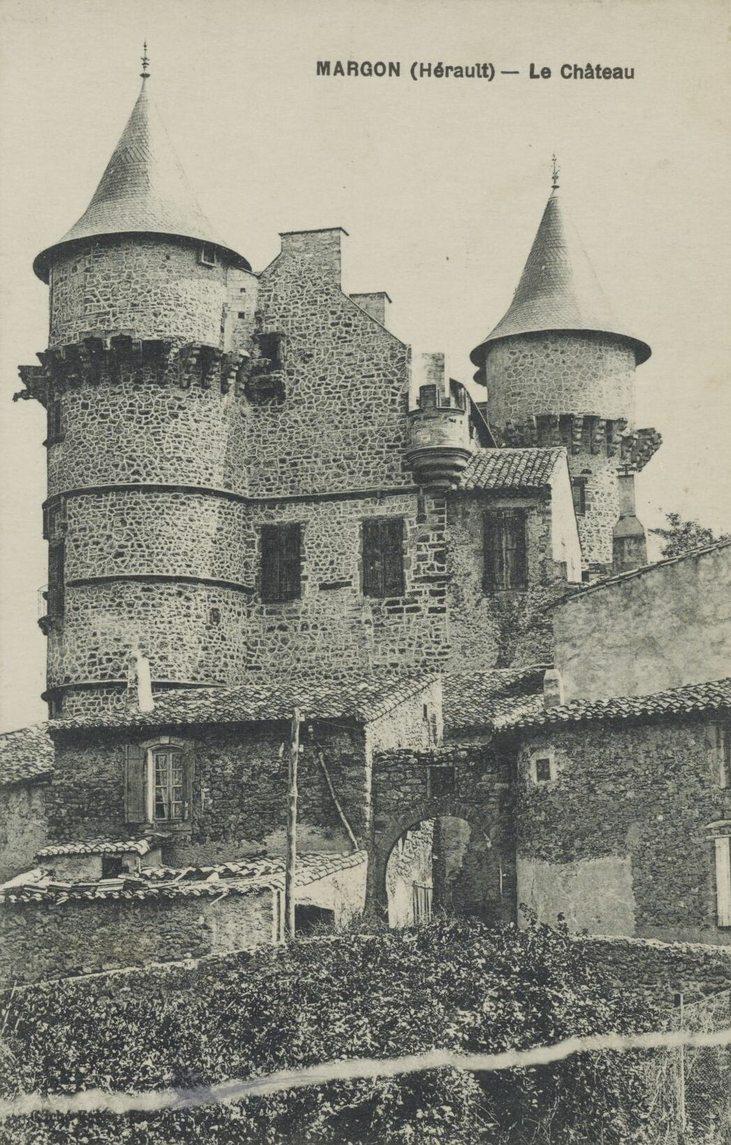 Margon. - Le château : carte postale.